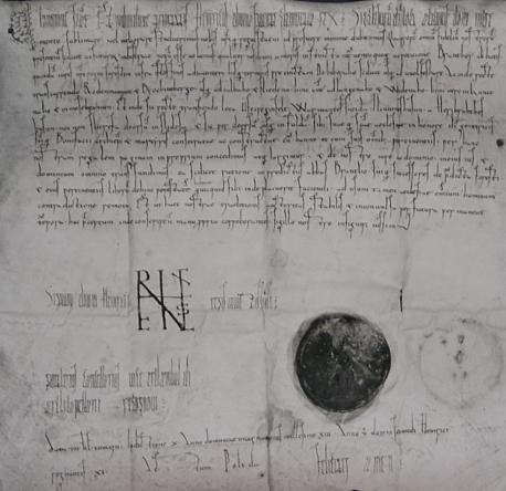 Urkunde König Heinrichs II. vom 29.12.1012.